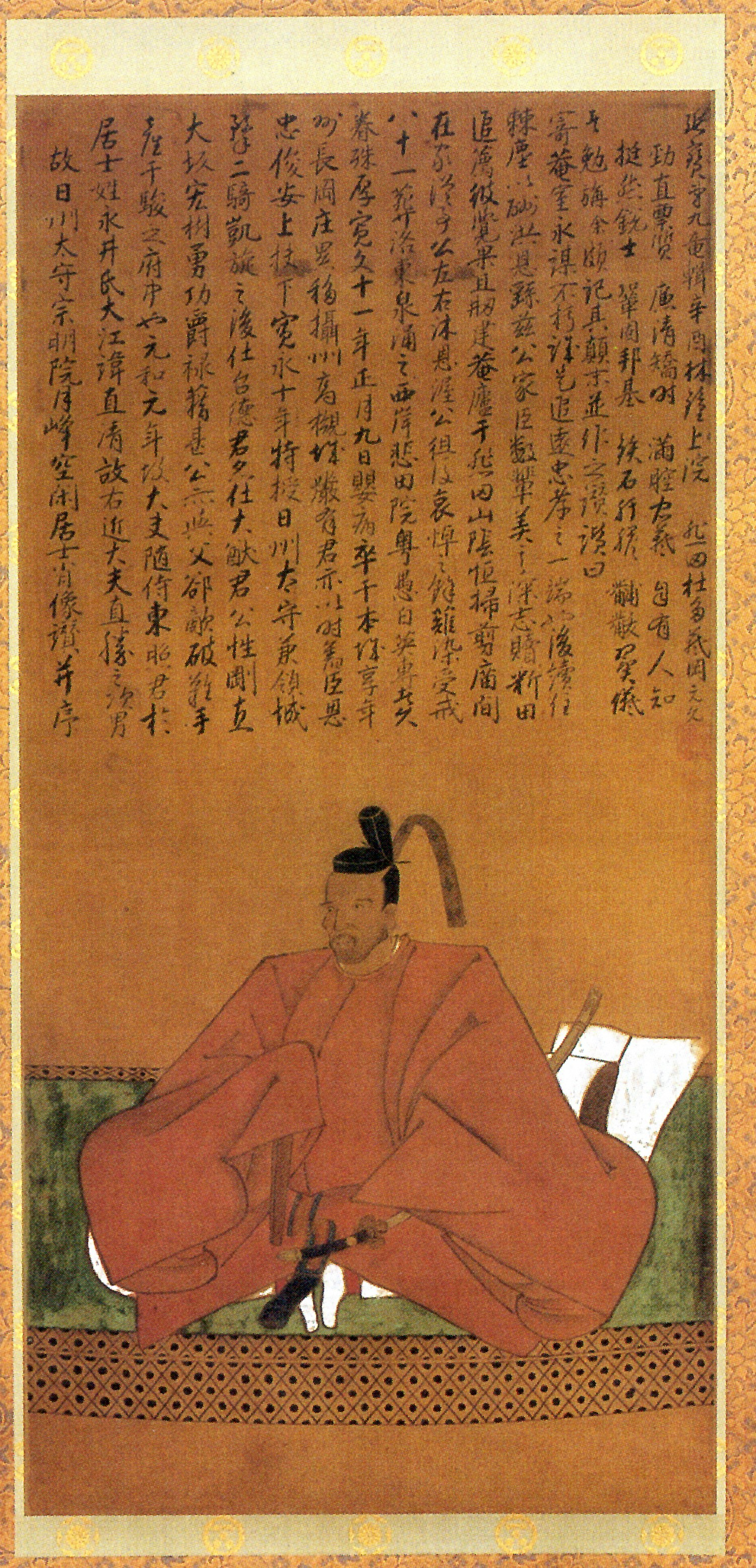 永井直清の肖像。